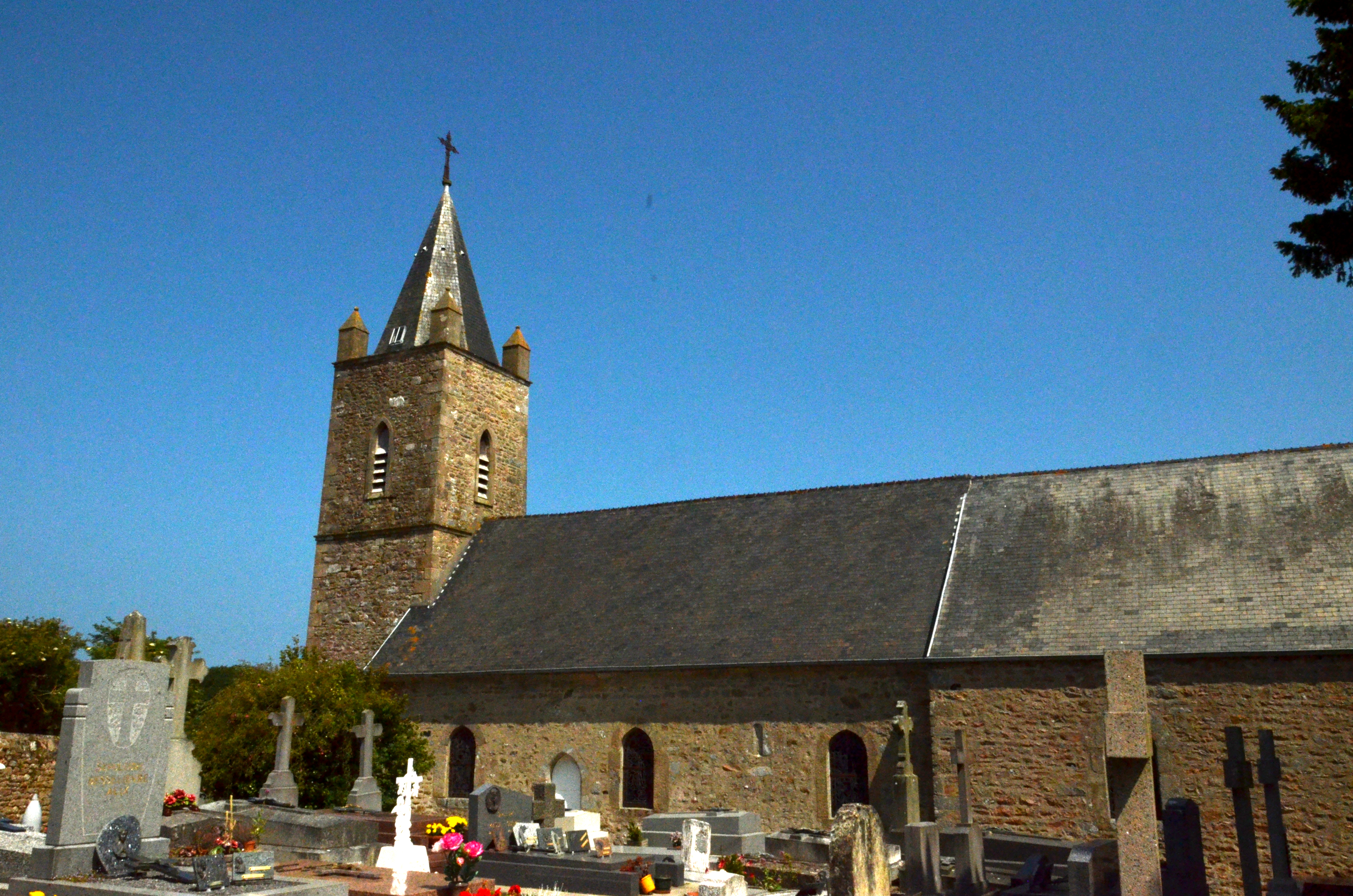 Église Saint-Malo de Carneville.